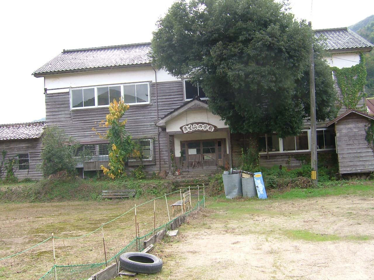 旧岩美町立蒲生中学校校舎